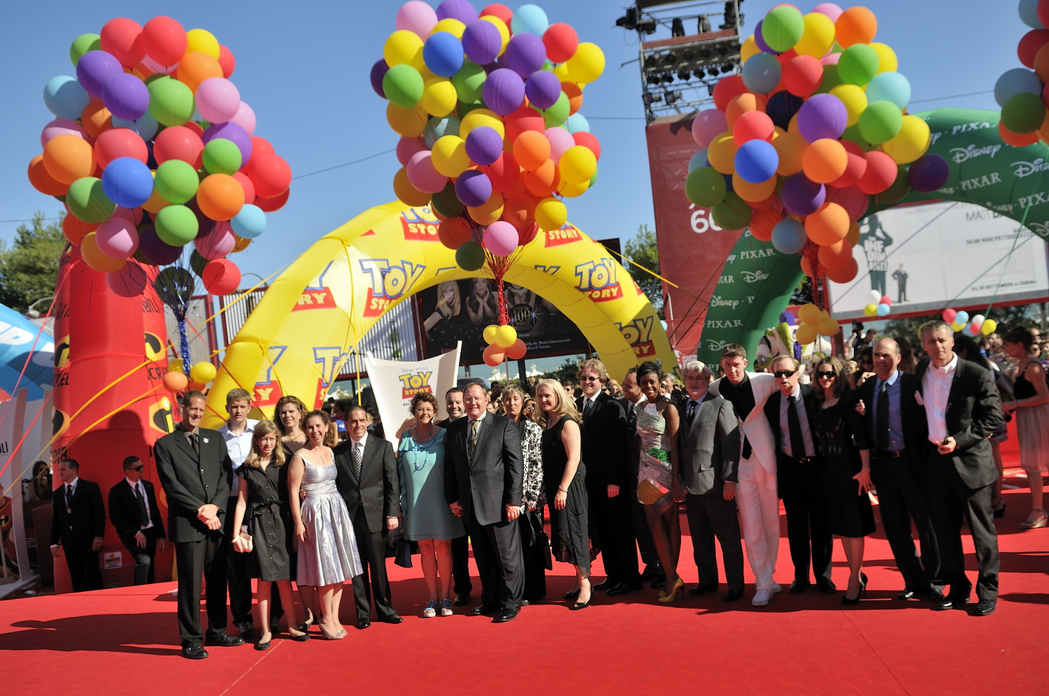 66ème Festival du Cinéma de Venise (Mostra), 5ème jour (06/09/2009) George Lucas et les réalisateurs de Pixar reçoivent un Lion d'Or pour l'ensemble de leur carrière : John Lasseter (Toy Story, 1001 Pattes, Cars...), Brad Bird (Les Indestructibles, Ratatouille), Pete Docter (Monstres et Cie, Là-haut), Andrew Stanton (Le Monde de Nemo, WALL•E) et Lee Unkrich (Toy Story 2, Monstres et Cie, Le Monde de Nemo)